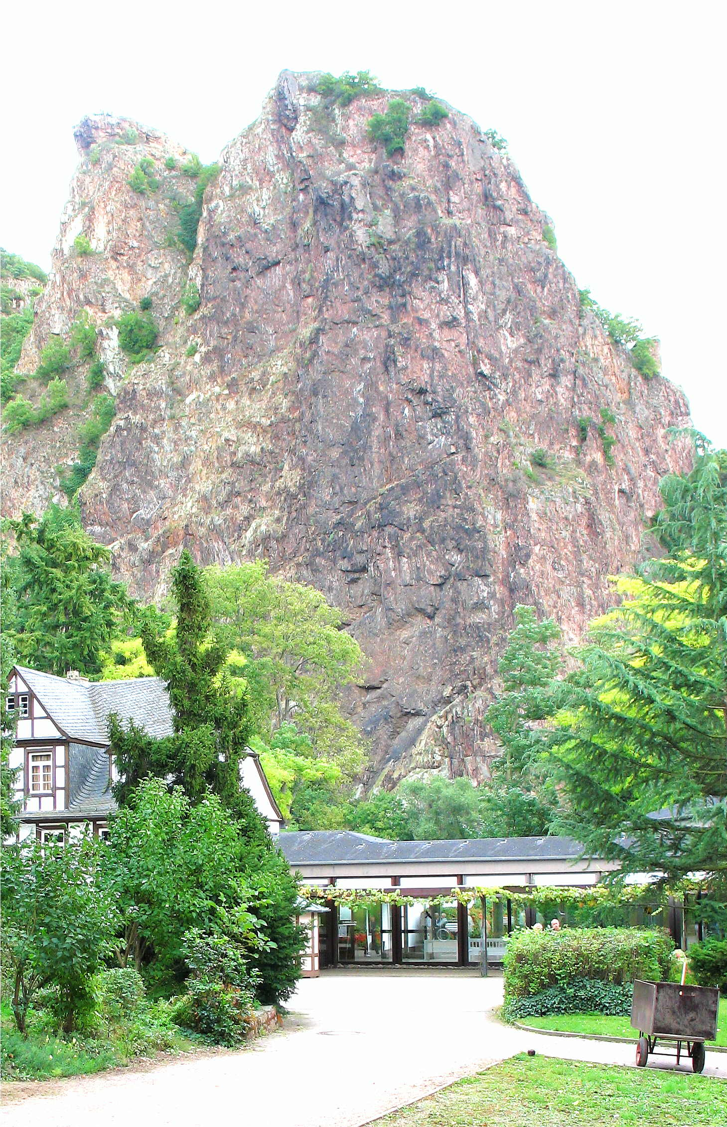 Rheingrafenstein